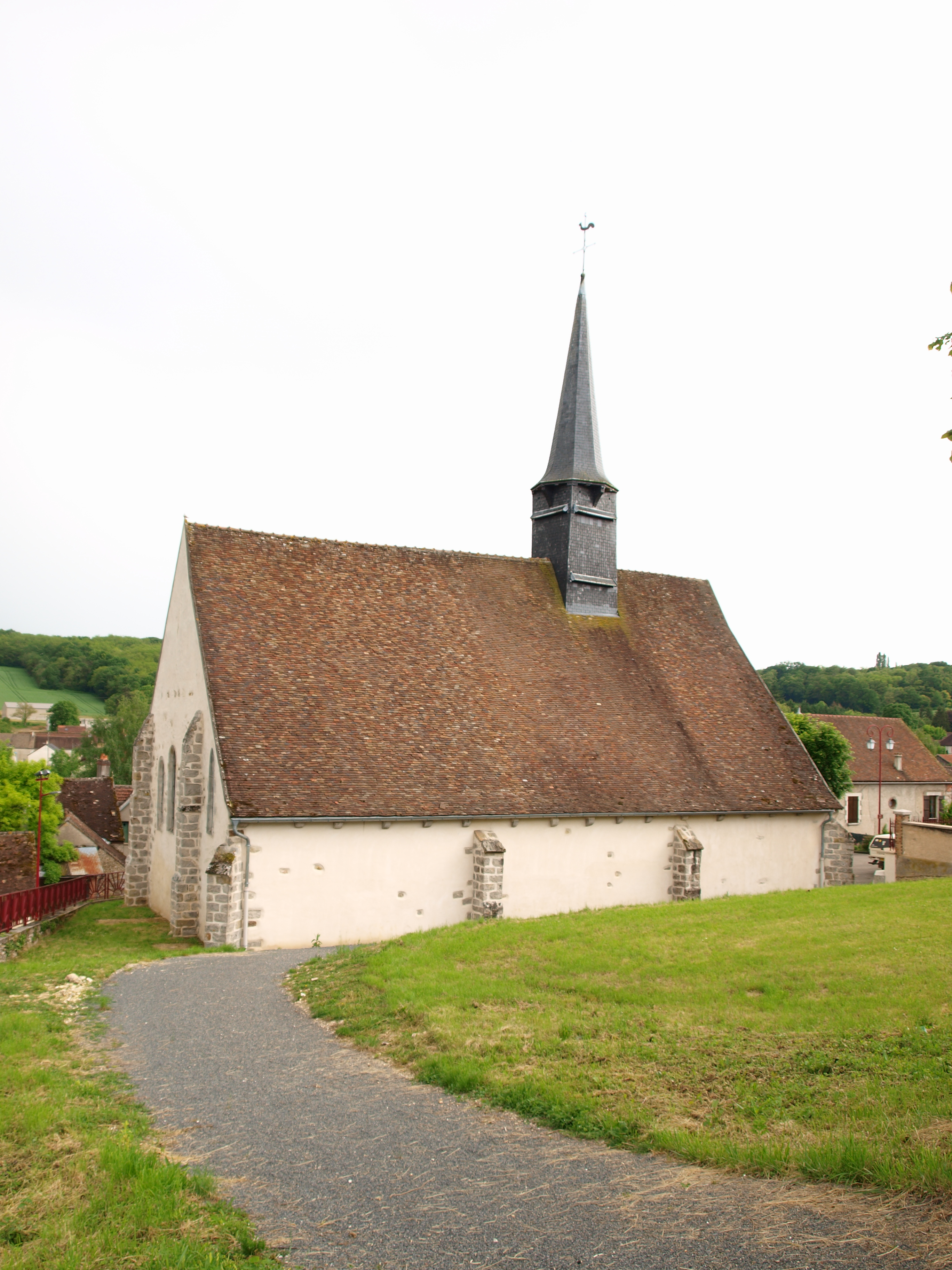 Collemiers (Yonne, France)